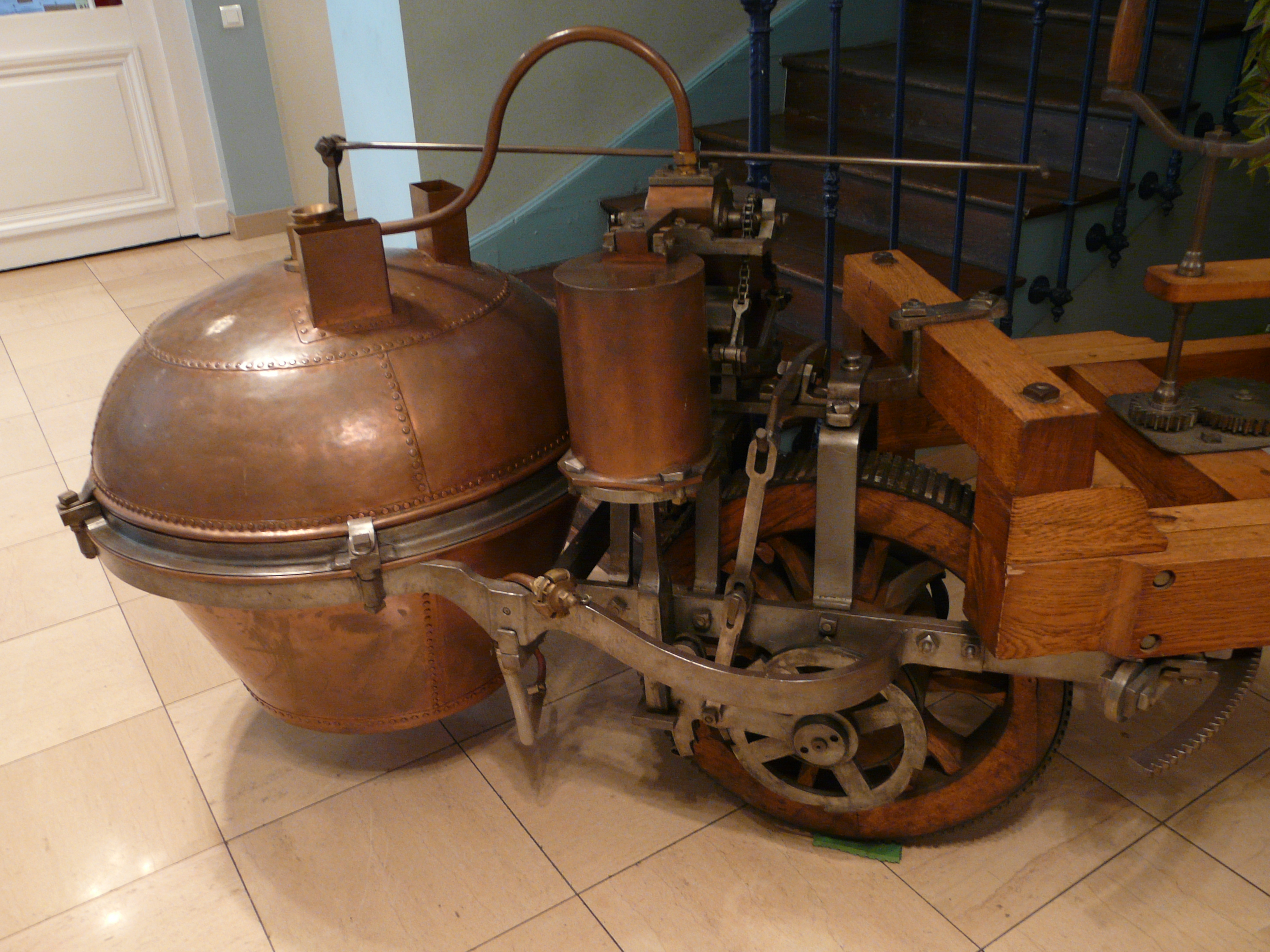 Modèle réduit (échelle 1/2) du fardier de Nicolas-Joseph Cugnot réalisé en 1988 par le lycée N.J. Cugnot et exposé à la mairie de Void-Vacon